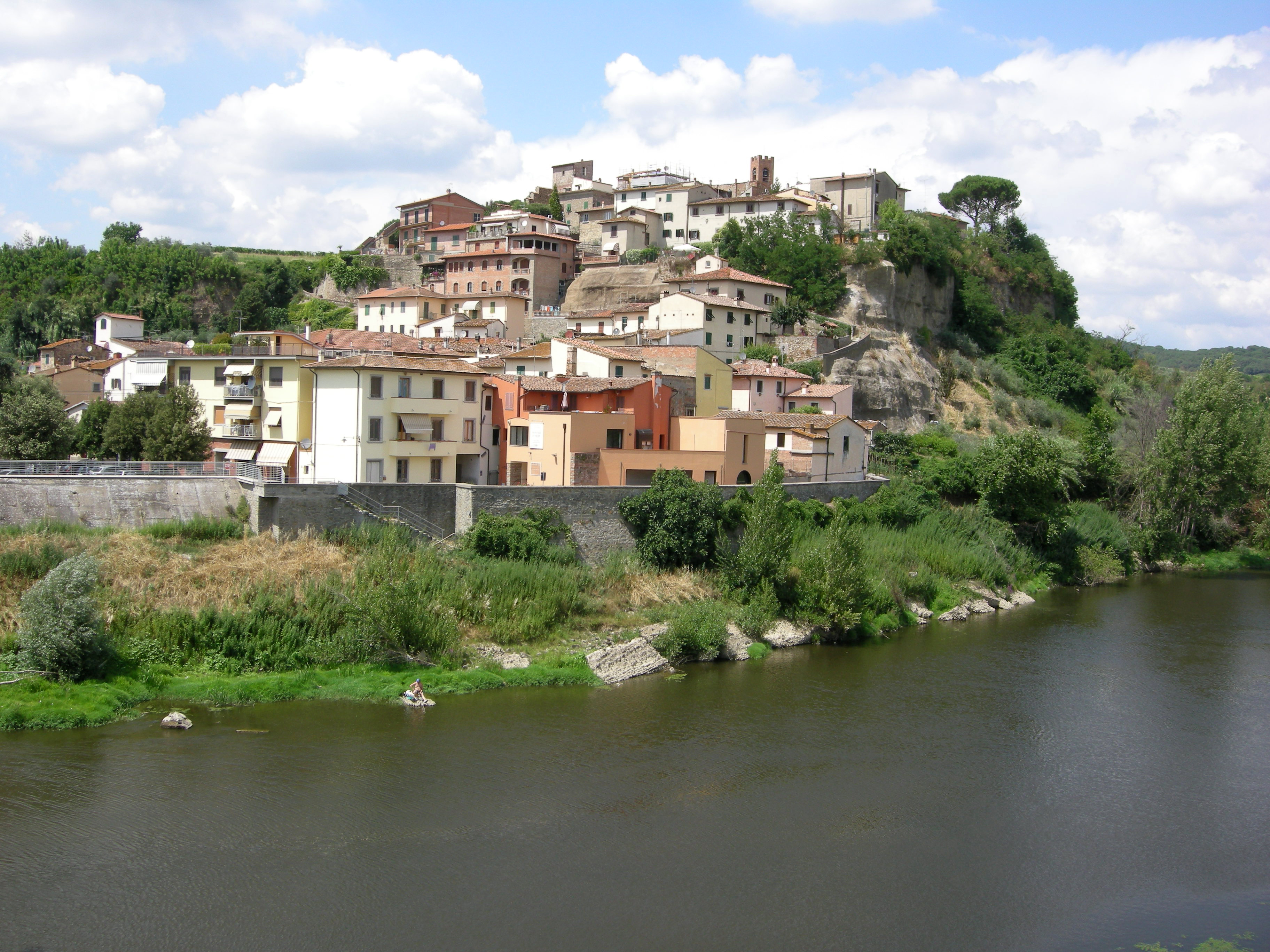 Capraia, Toscana